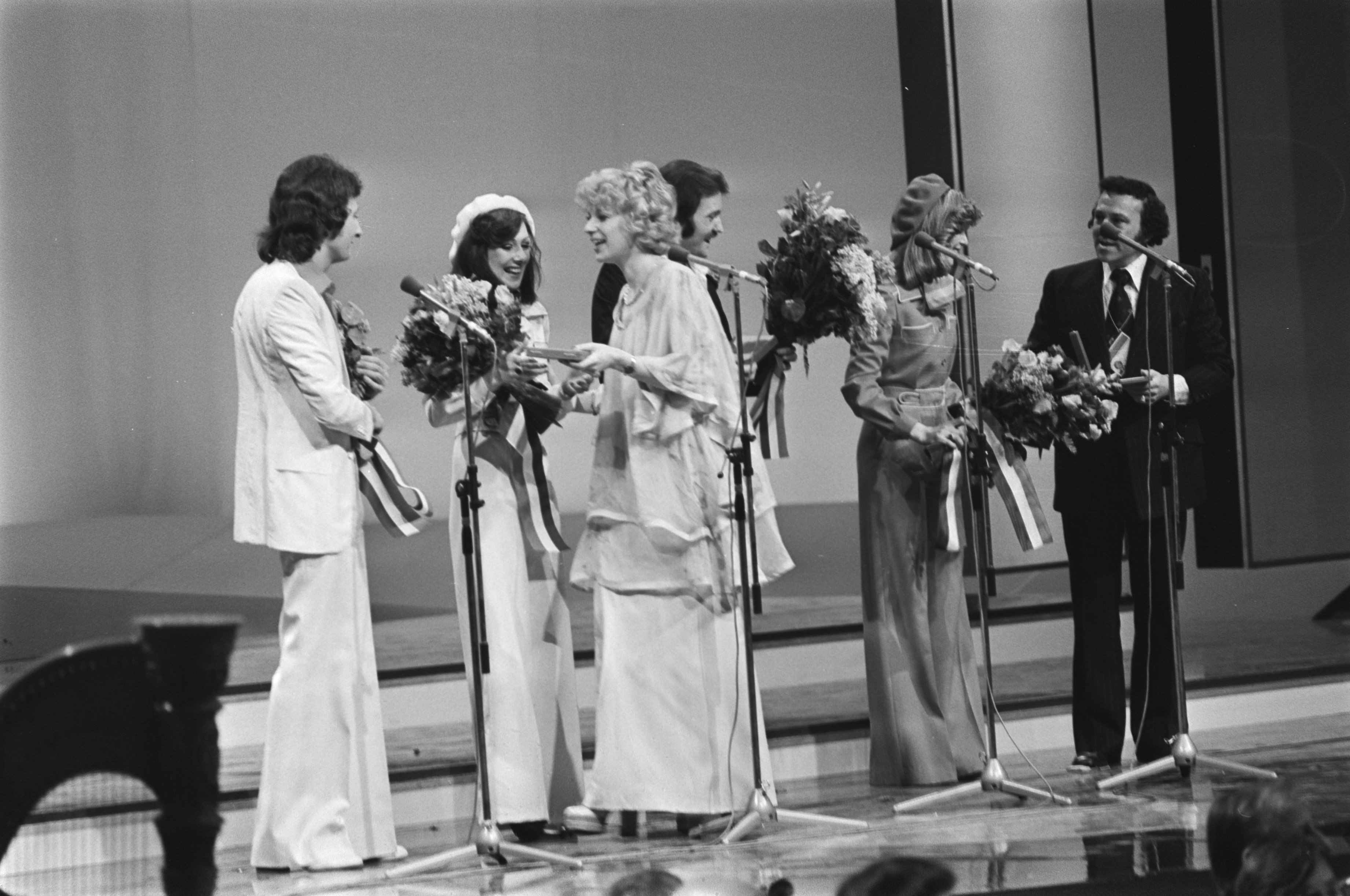 Collectie / Archief : Fotocollectie Anefo Reportage / Serie : [ onbekend ] Beschrijving : Eurovisie Songfestival 76 Den Haag ; winnaars Brotherhood of Man krijgen van Getty ( Teach Inn ) de medailles Datum : 3 april 1976 Locatie : Den Haag, Zuid-Holland Trefwoorden : MEDAILLES, Winnaars, songfestivals Persoonsnaam : Brotherhood Of Man, Eurovisie Songfestival Instellingsnaam : Teach In Fotograaf : Mieremet, Rob / Anefo Auteursrechthebbende : Nationaal Archief Materiaalsoort : Negatief (zwart/wit) Nummer archiefinventaris : bekijk toegang 2.24.01.05 Bestanddeelnummer : 928-5008